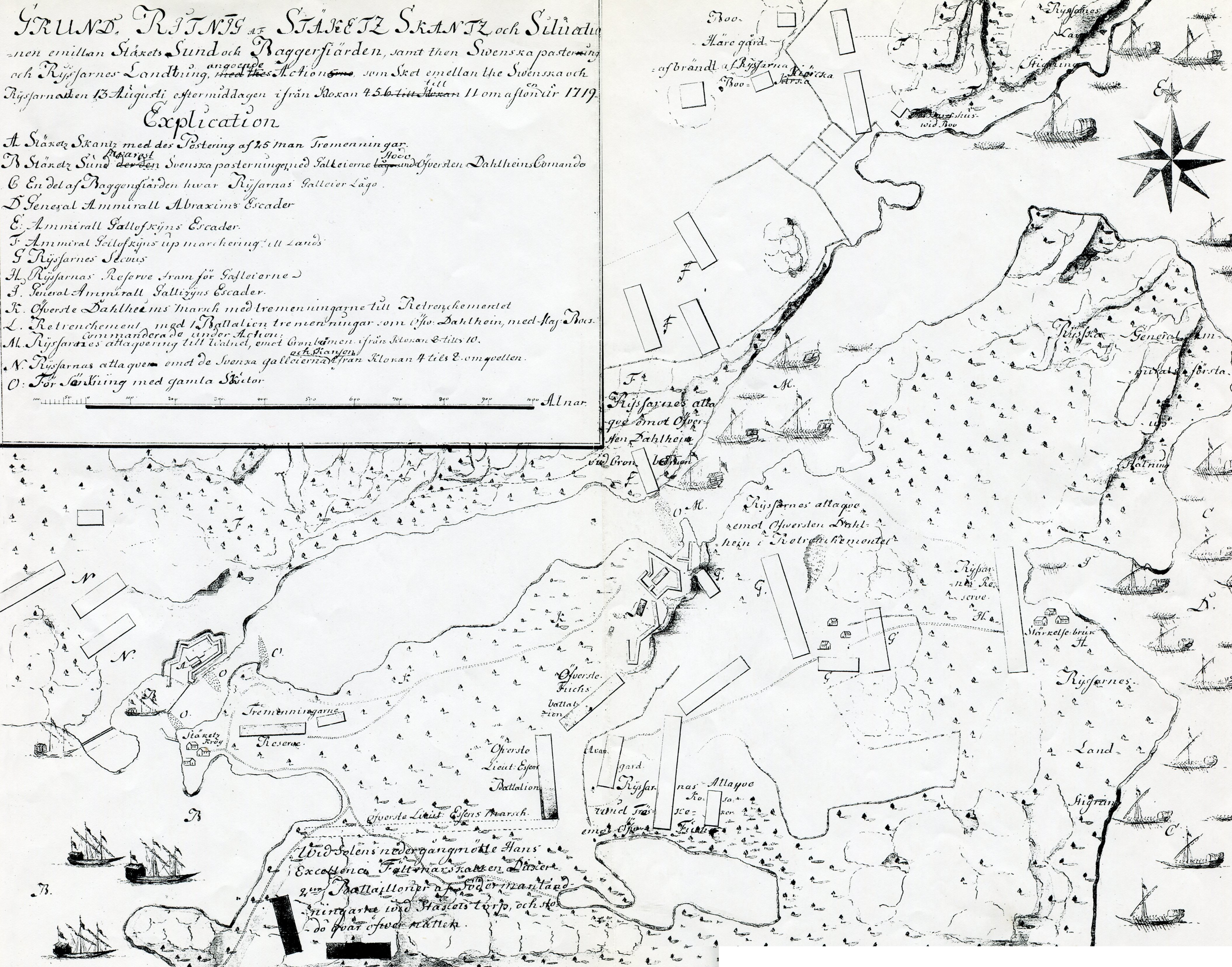 Slaget vid Stäket: Den taktiska uppställningen vid slagets början. I vänstra delen av bilden skansen vid Stäkesund på Boo sidan. Till höger skansen vid Knapens hål på Skogsö där själva huvudstriden ägde rum. Kartan är gjord av Baltzar von Dahlheims son och inte helt tillförlitlig.